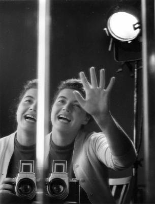 Fotografie Marie Šechtlové; Marie Šechtlová´s photographs Autoportrét